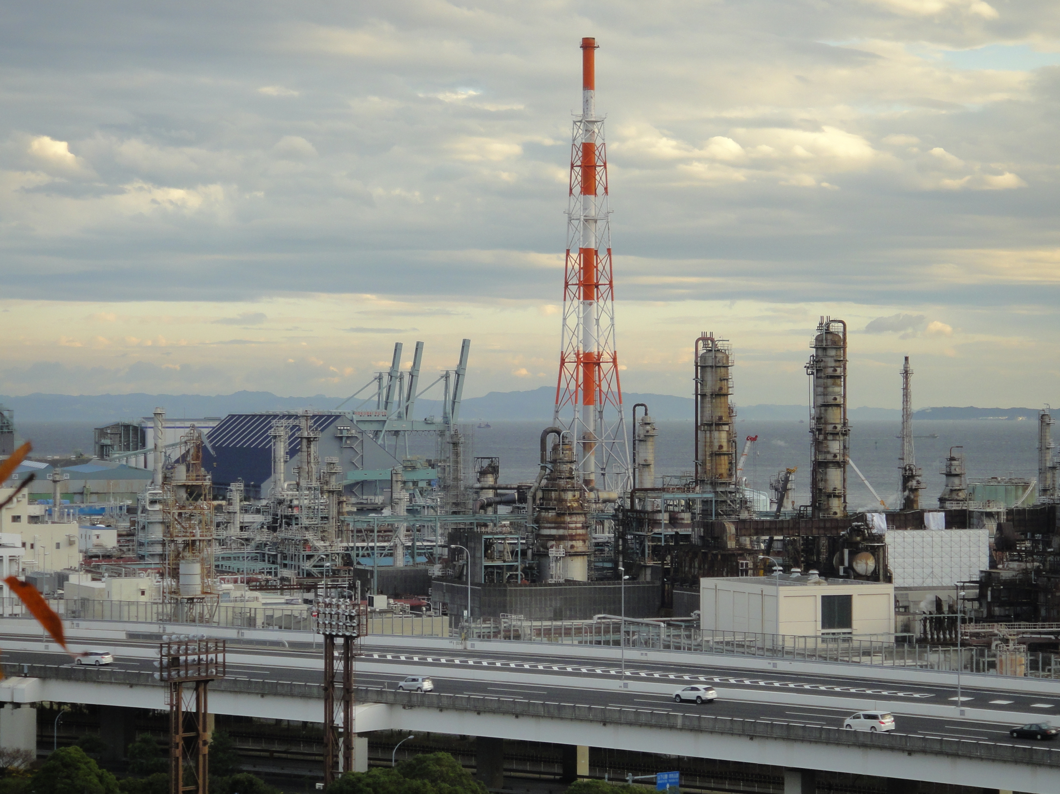 Negishi oil refinery from Sankeien garden